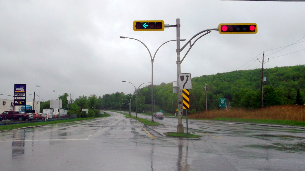 Route 143 vers le nord